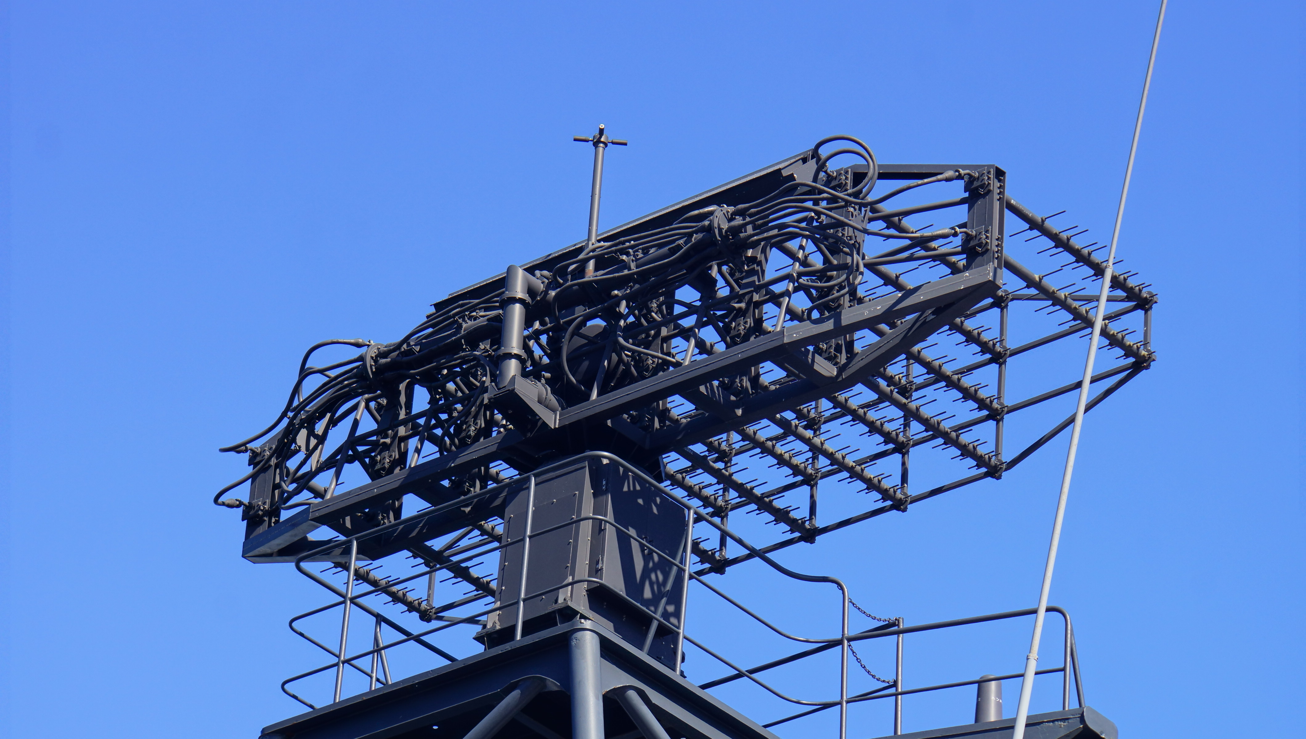 海上自衛隊 ミサイル護衛艦はたかぜ（DDG-171）艦上のOPS-11C 2次元対空捜索レーダー 後部。 14年10月19日 堺泉北港にて。